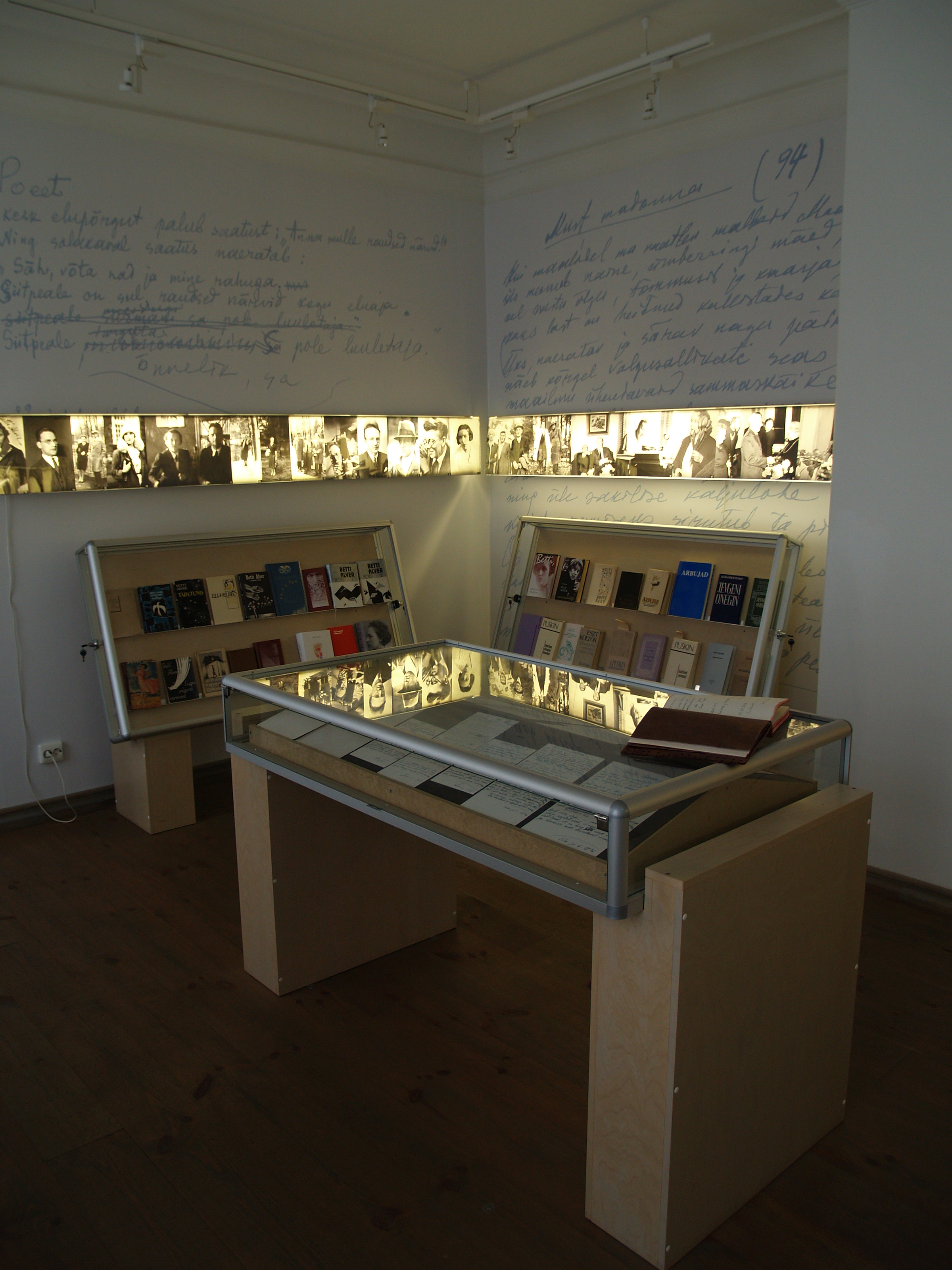 Betti Alveri muuseum